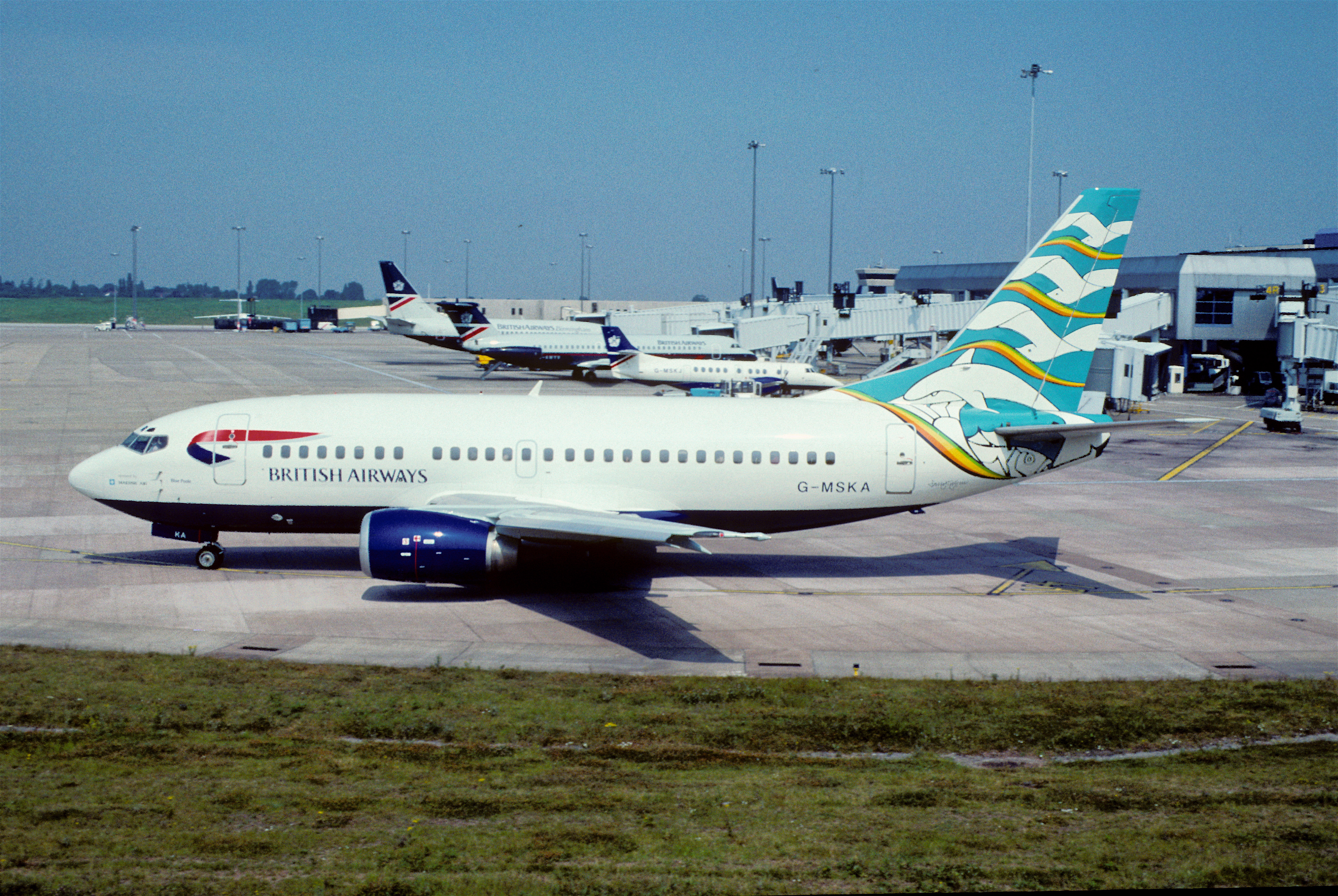 Maersk Air UK Boeing 737-5L9; G-MSKA@BHX, August 1997/ BLF